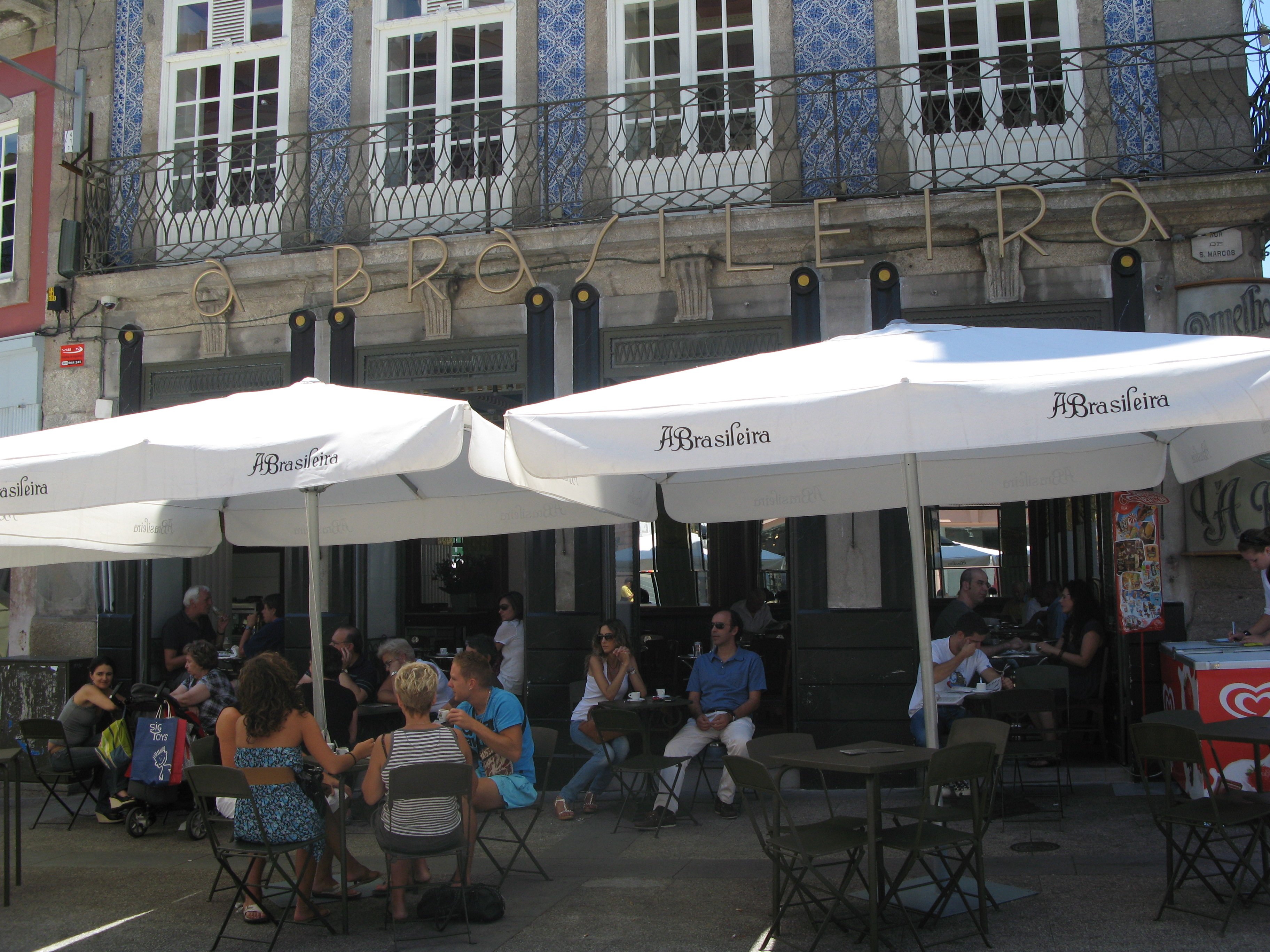 A Brasileira, um dos cafés mais antigos da cidade de Braga.